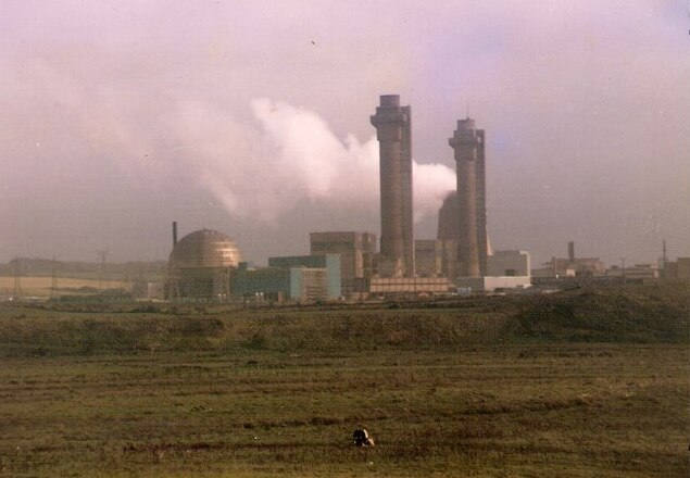 Storm Clouds over Sellafield